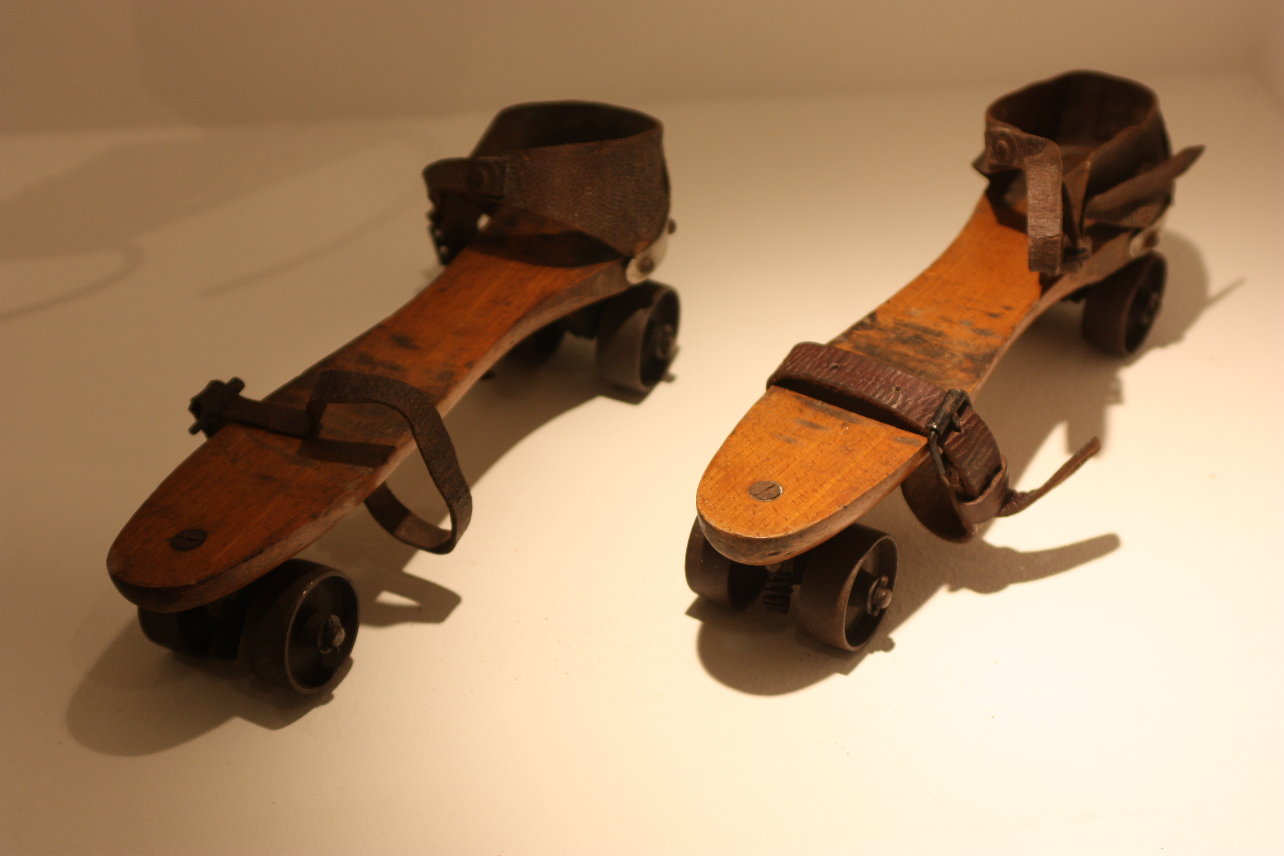 Exposition "Paris, capitale du roller" - 5 september 2008 at Hôtel de Ville de Paris.